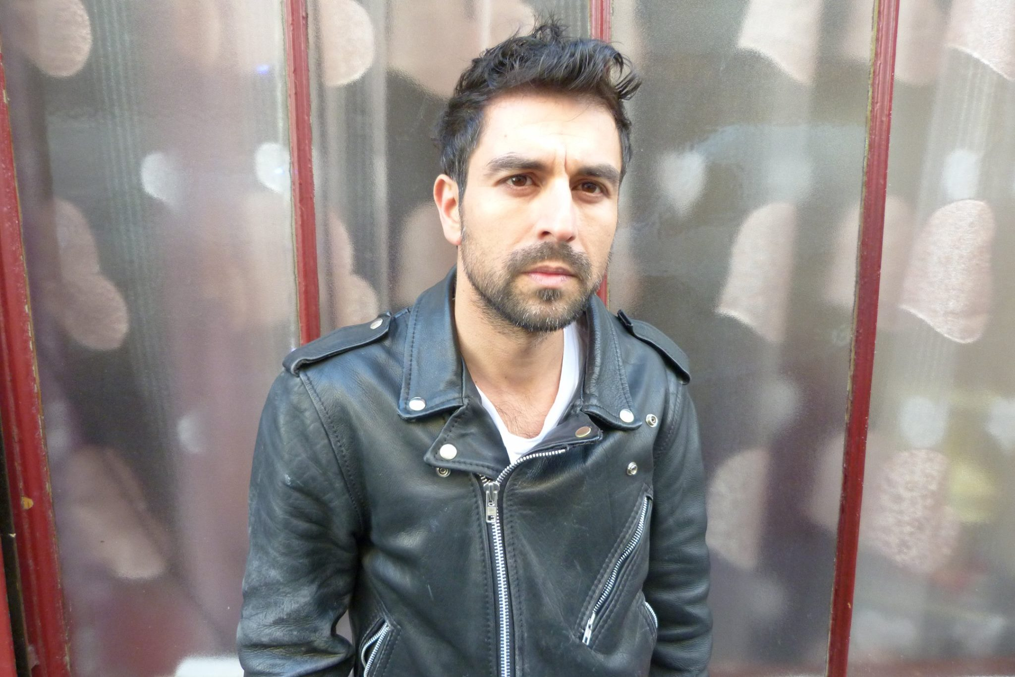 by Matthew Allen